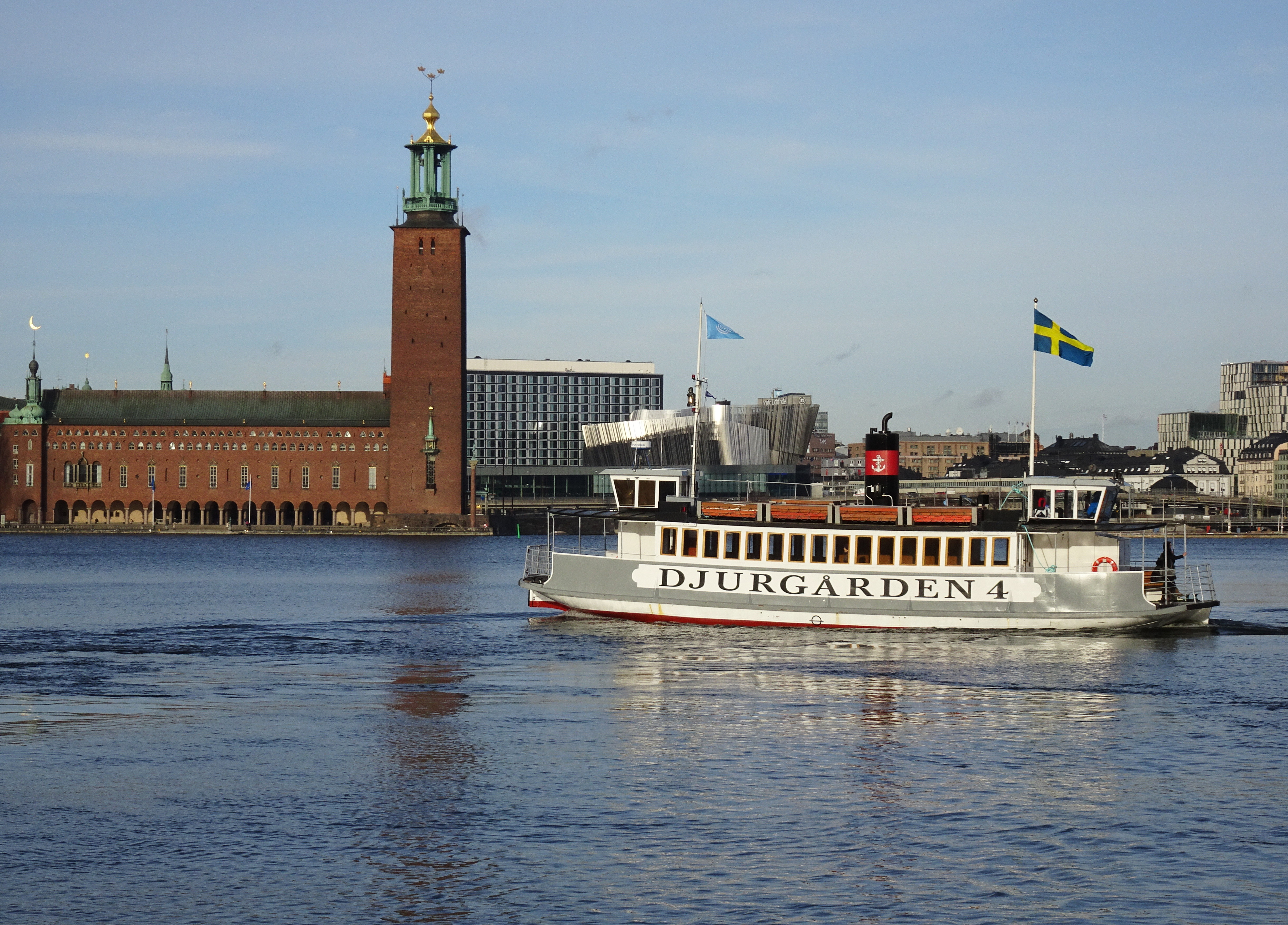 Djurgården 4 på Riddarfjärden med Stadshuset i bakgrunden